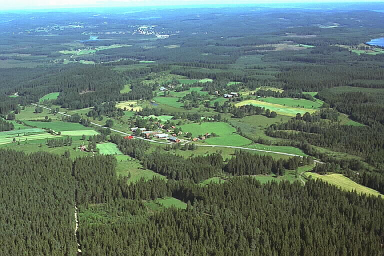 Motiv: Grindsbo-Sprängsbo Nyckelord: Flygbilder, Riksintressen Kategori: Miljöer, OdlingslandskapGrindsbo-Sprängsbo